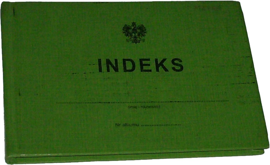 indeks studencki, zielony